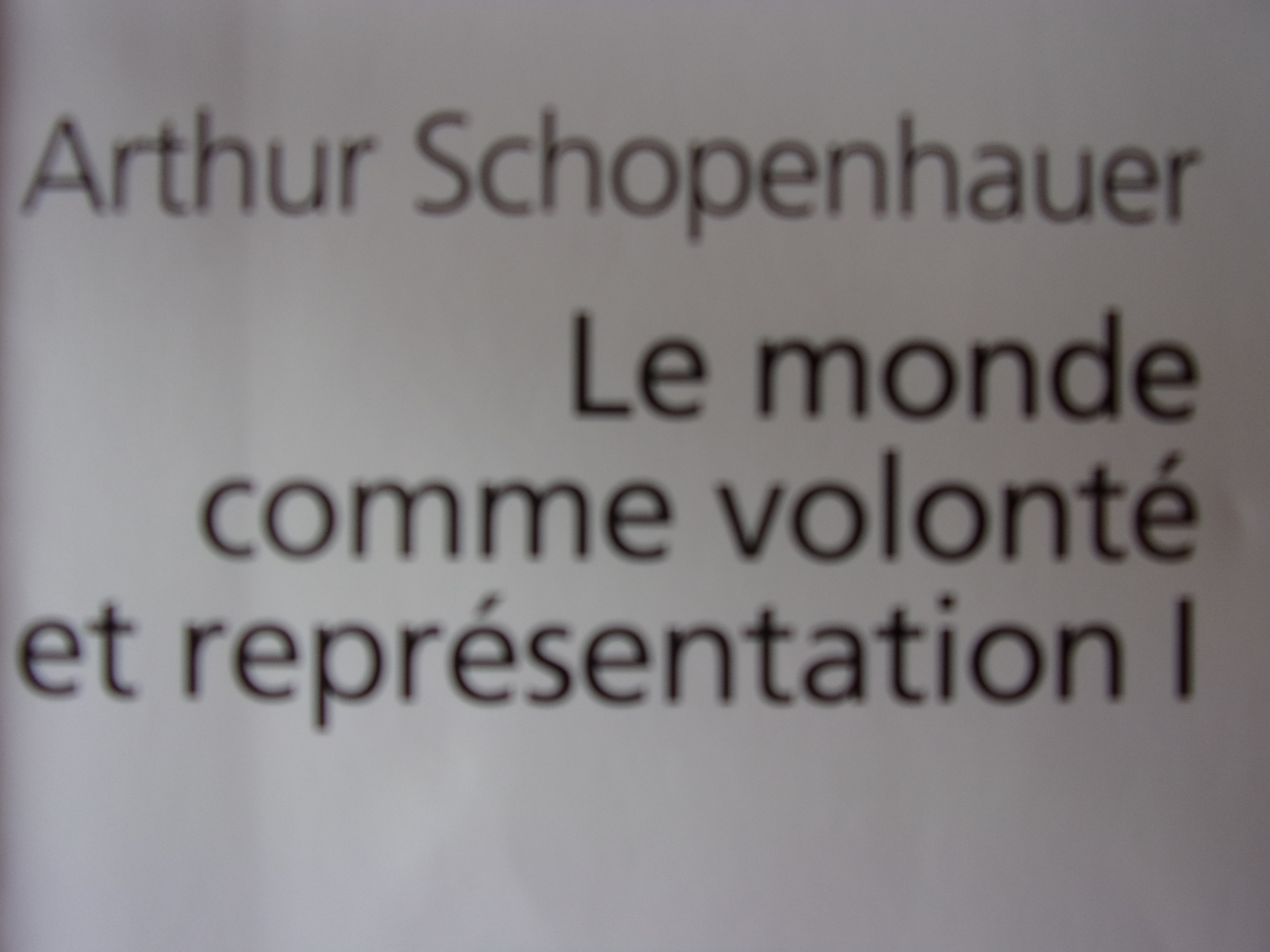 Édition française de l'ouvrage.